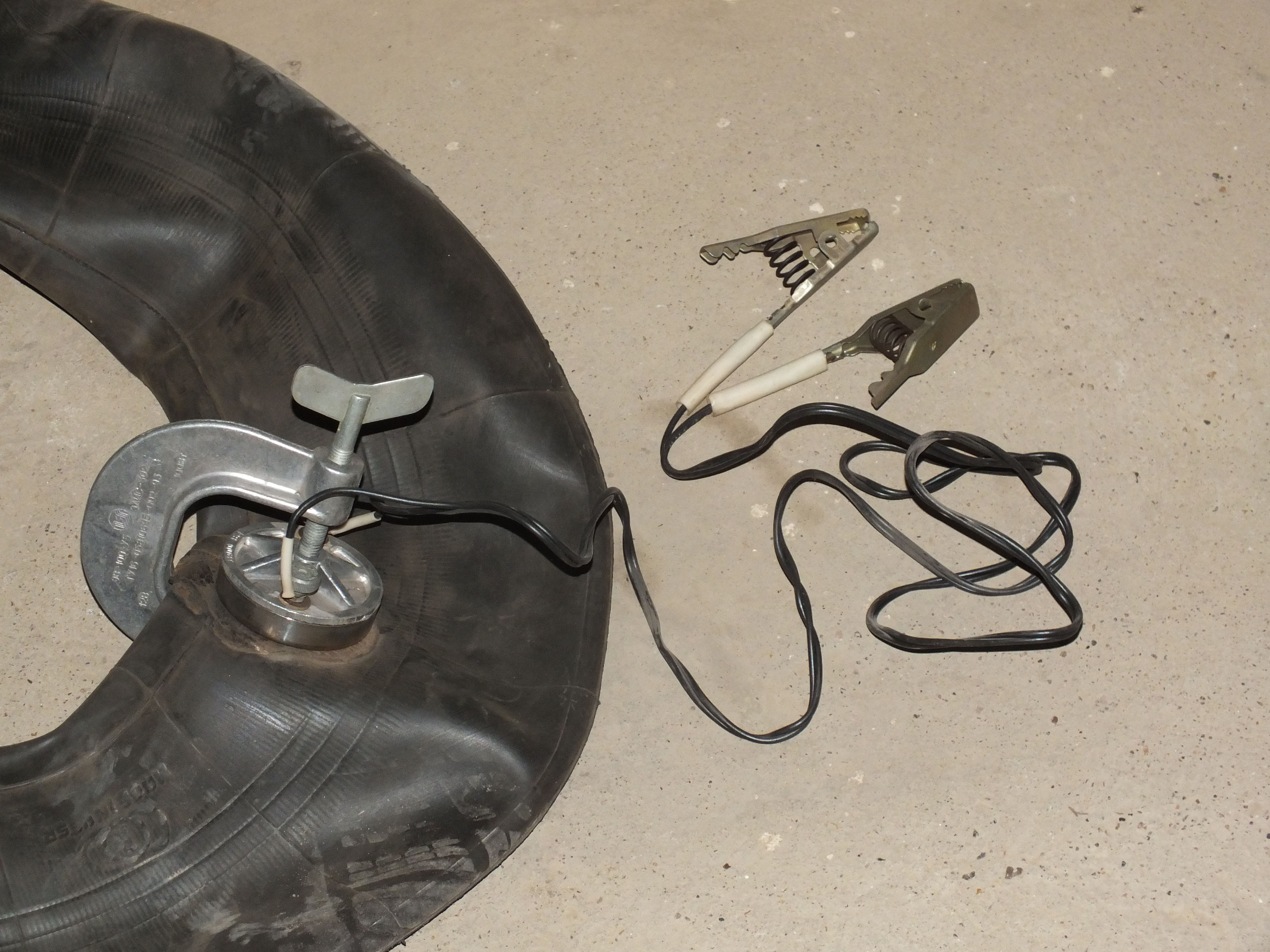 Вулканизатор